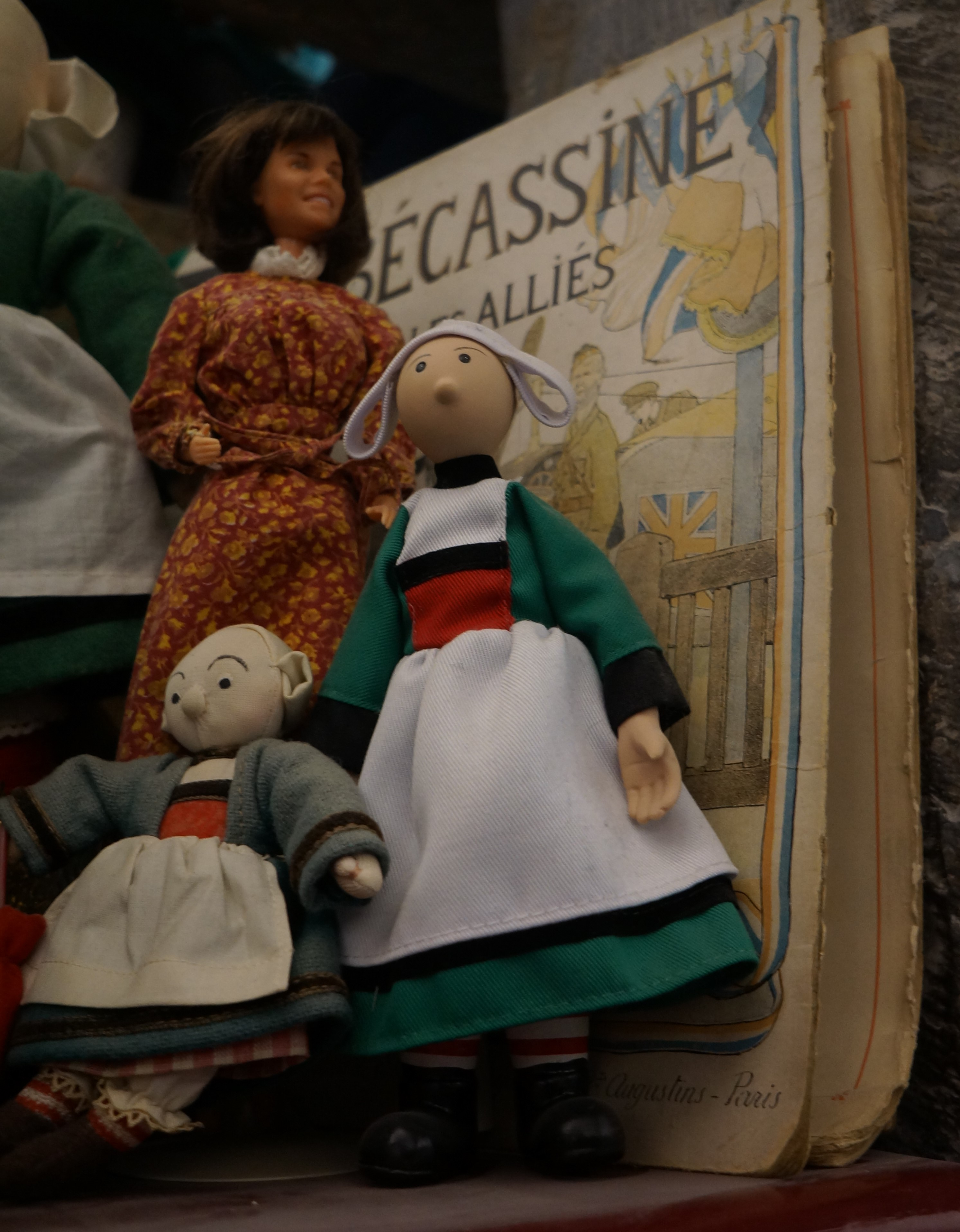 Musée de la Poupée et du Jouet Ancien de Wambrechies (Nord) .- France